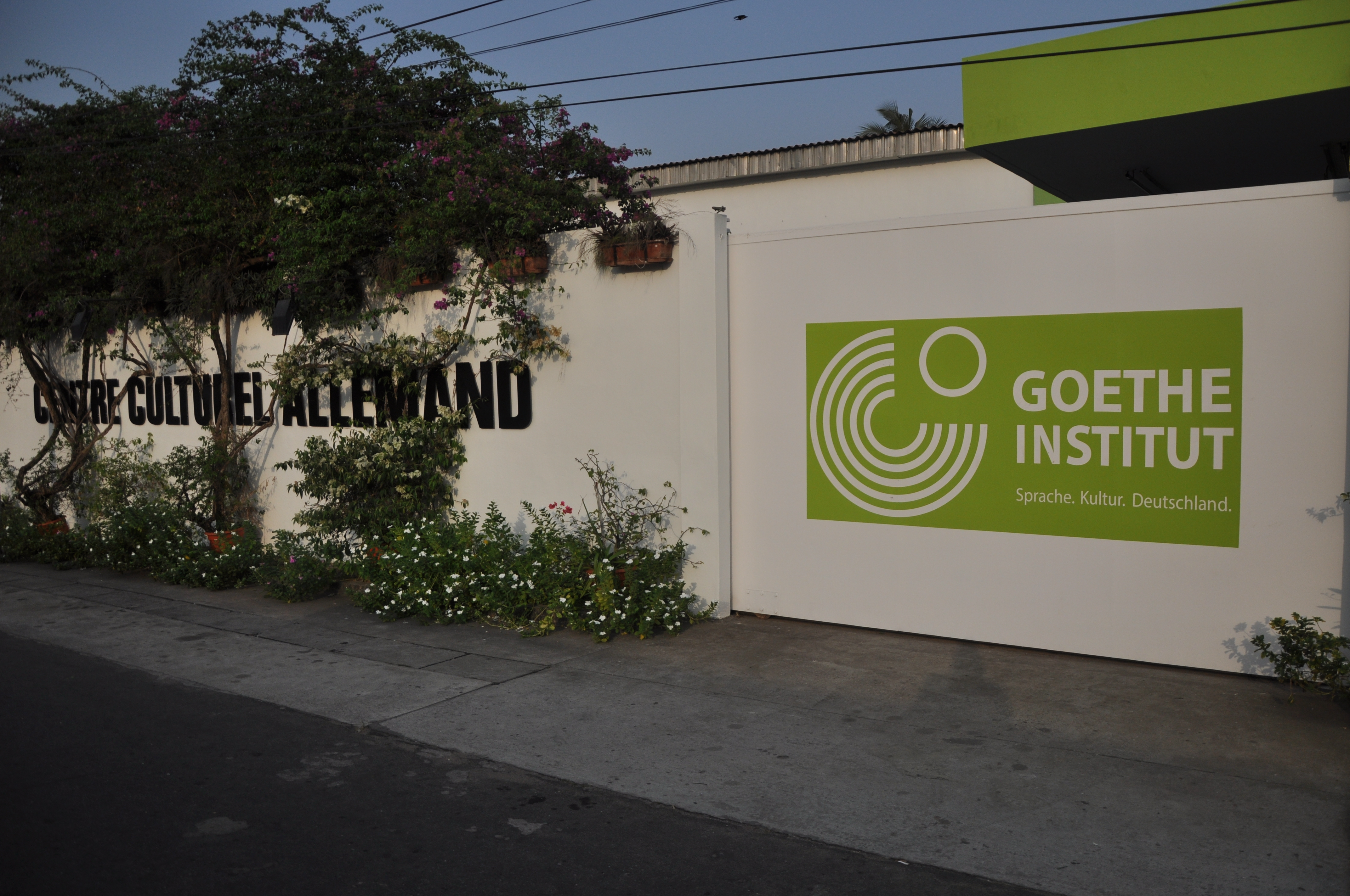 Goethe Institut (Centre culturel allemand) à Abidjan, en Côte d’Ivoire